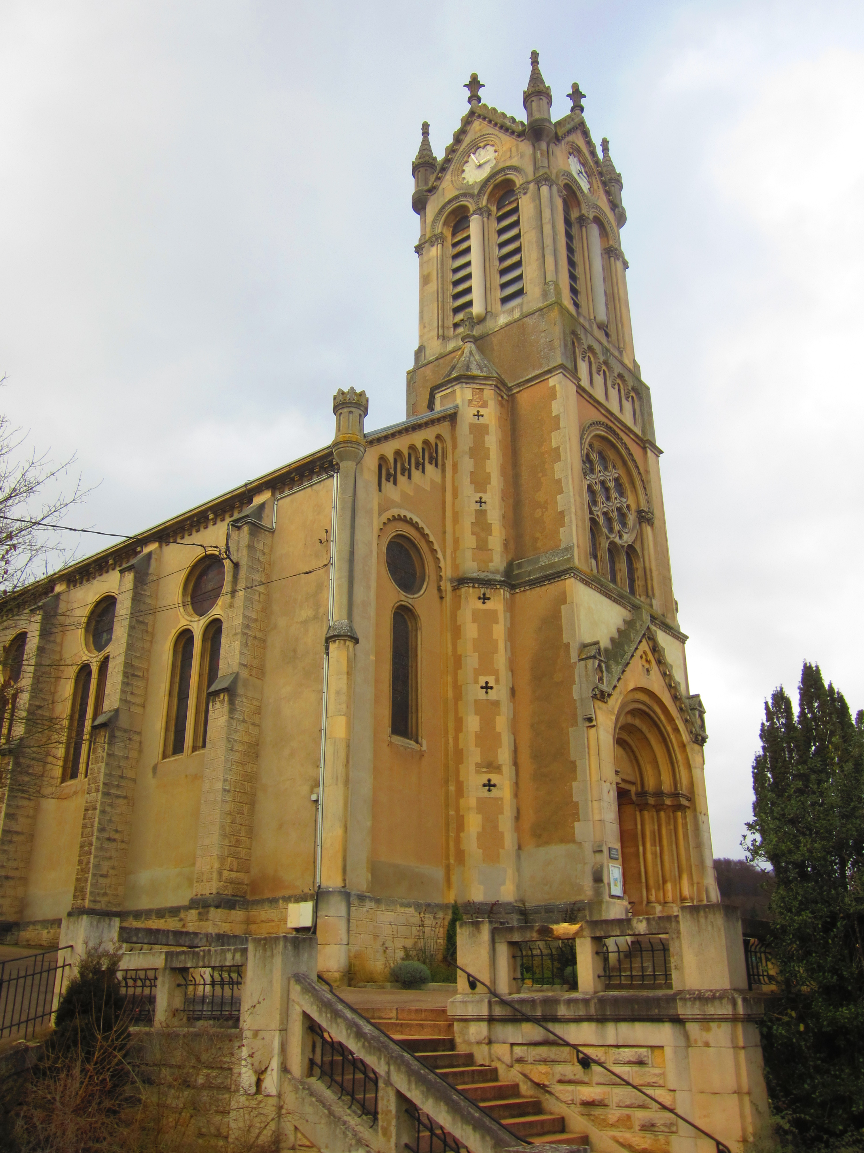 Maxeville eglise